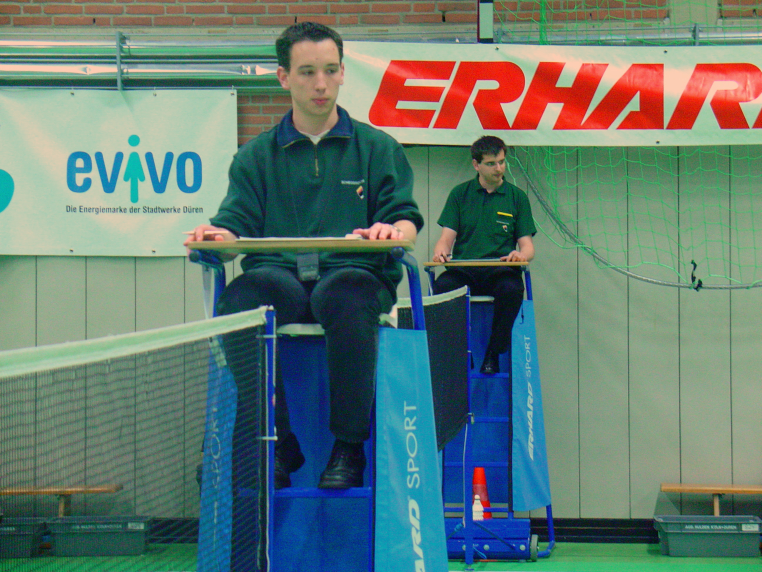 Badmintonschiedsrichter